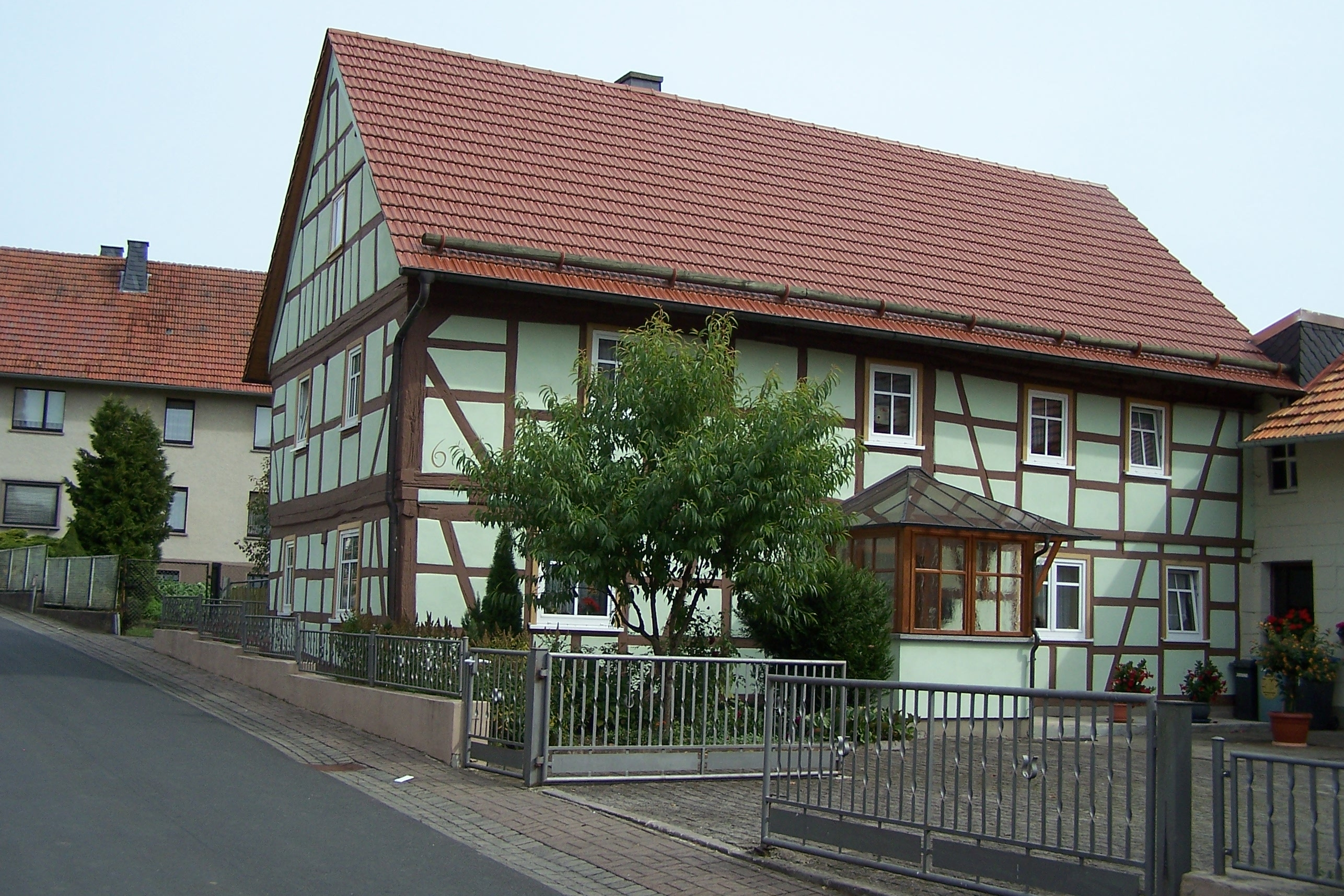 Gerstengrund